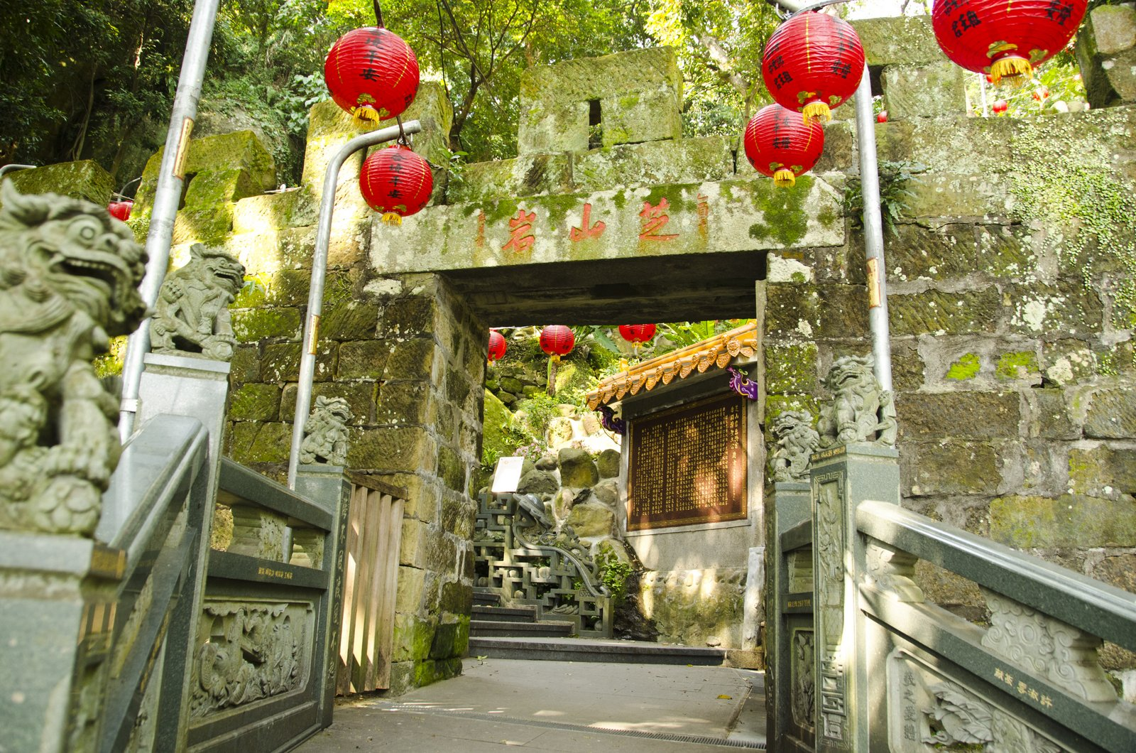 芝山岩隘門 古蹟編號 AA09602000022